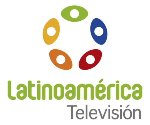 Latinoamérica Televisión (logo 2012)